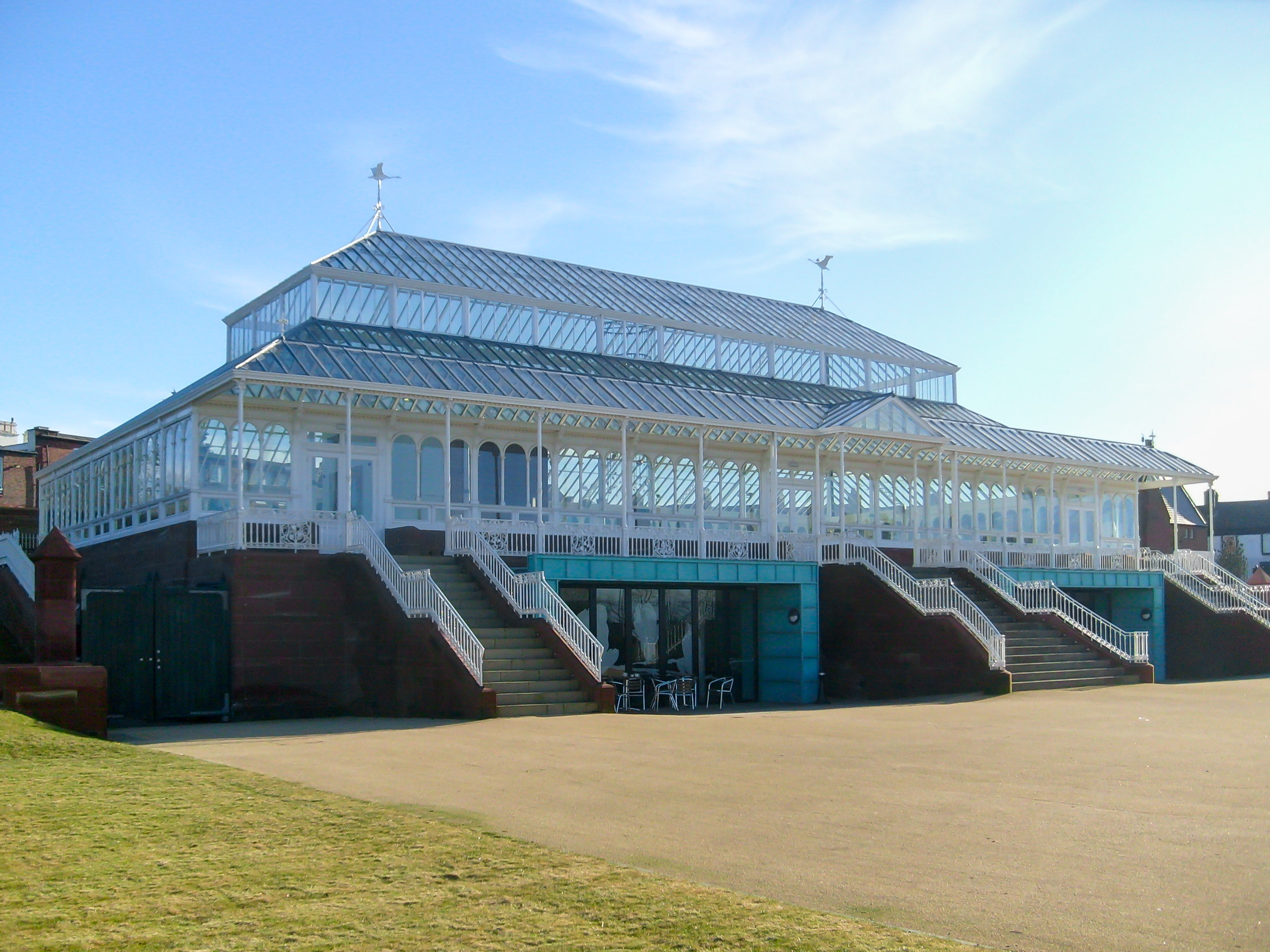 Stanley Park Feb 11 2010